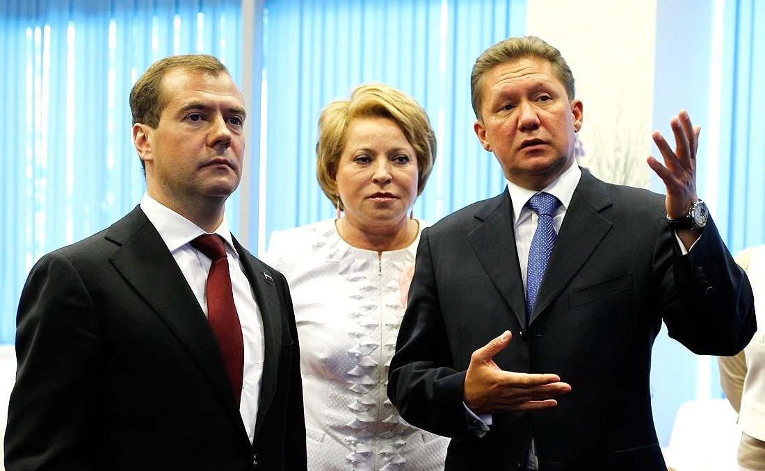 С губернатором Санкт-Петербурга Валентиной Матвиенко и председателем правления компании «Газпром» Алексеем Миллером на презентации проекта высотного офисного здания компании «Газпром» «Лахта-центр».